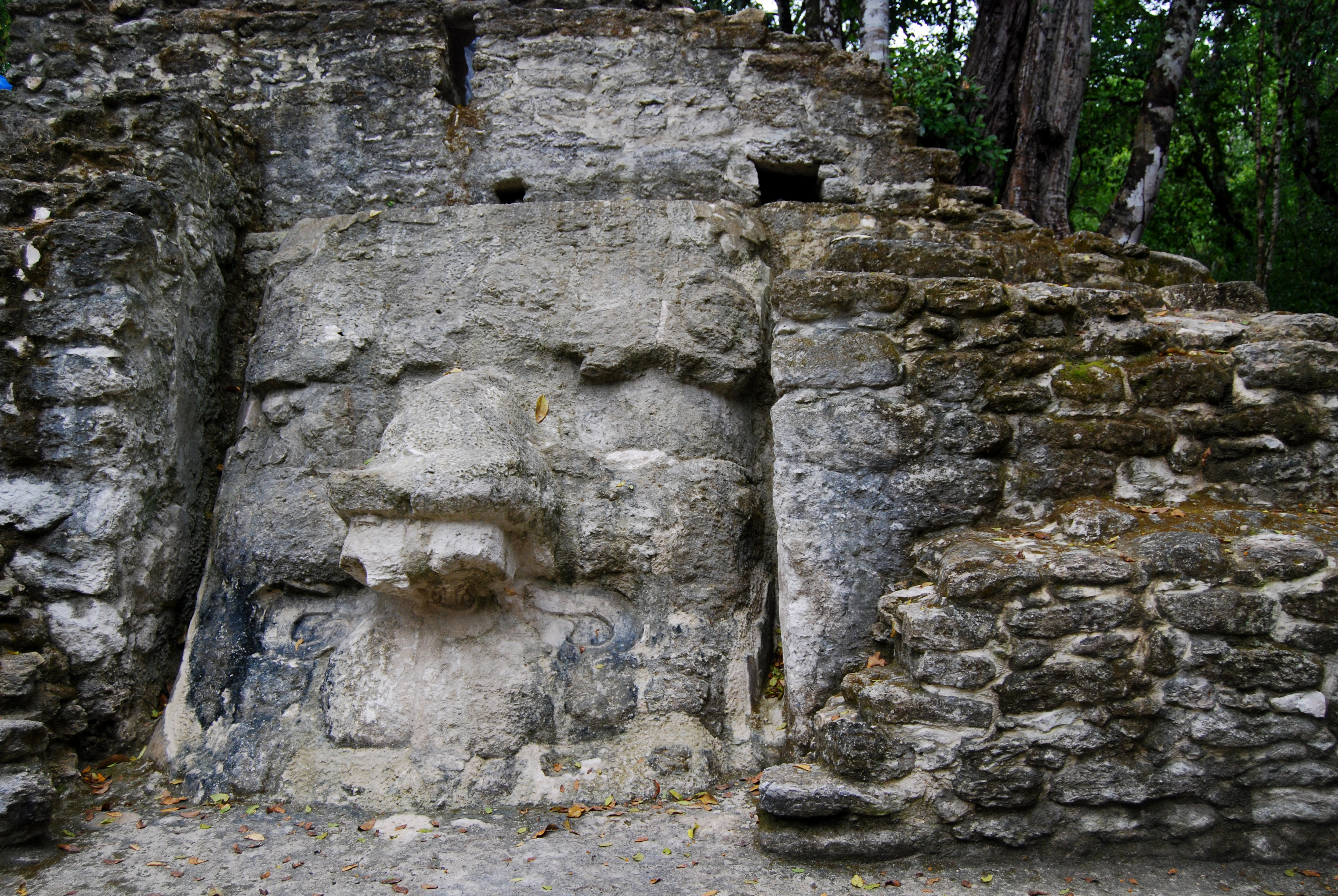 El Mirador archaeological site, El Petén, Guatemala